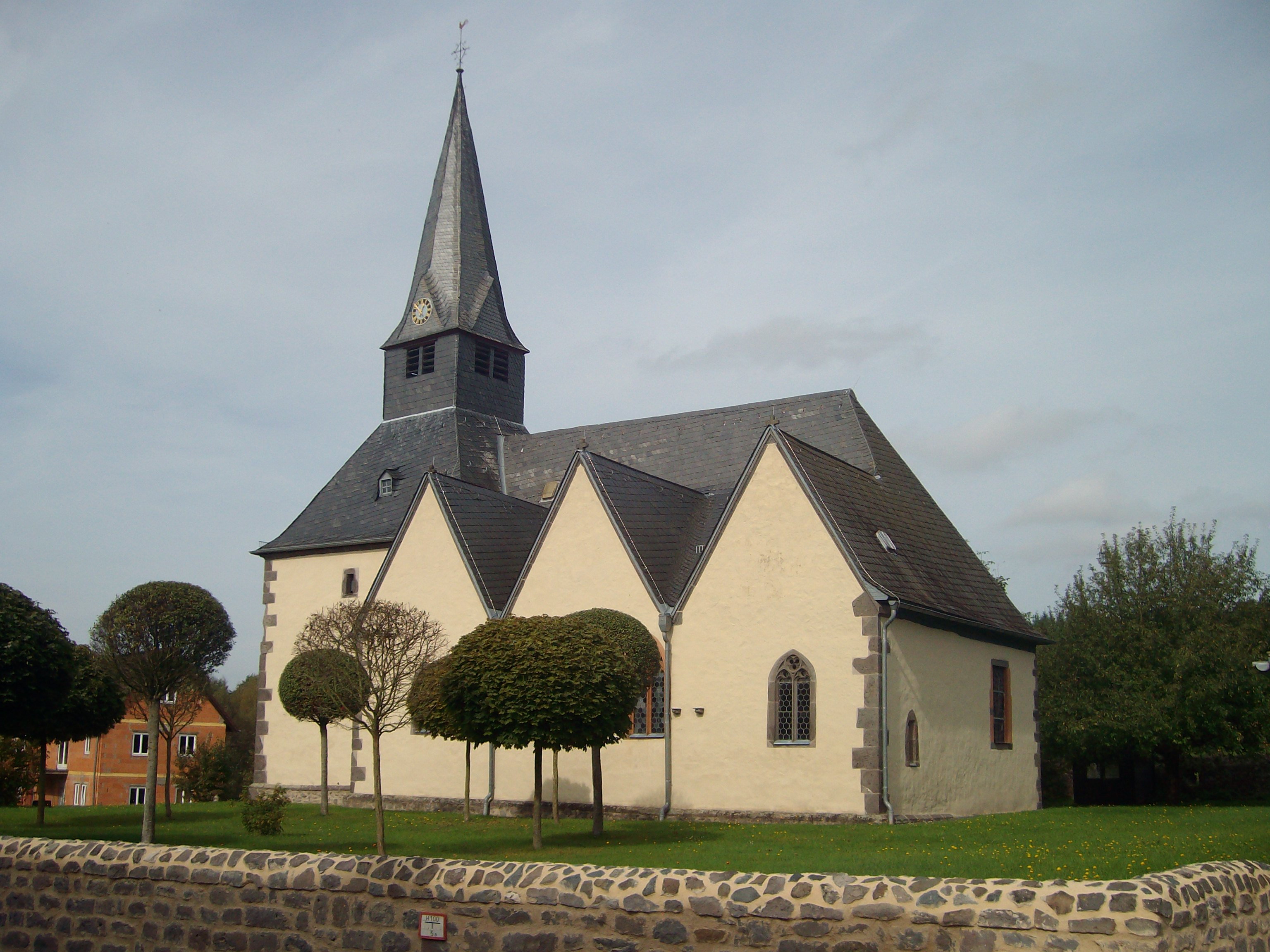 Evangelische Kirche Münster, Laubach, Landkreis Gießen, Hessen, Deutschland